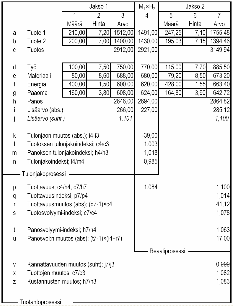 Tuotantomallin kuvaus